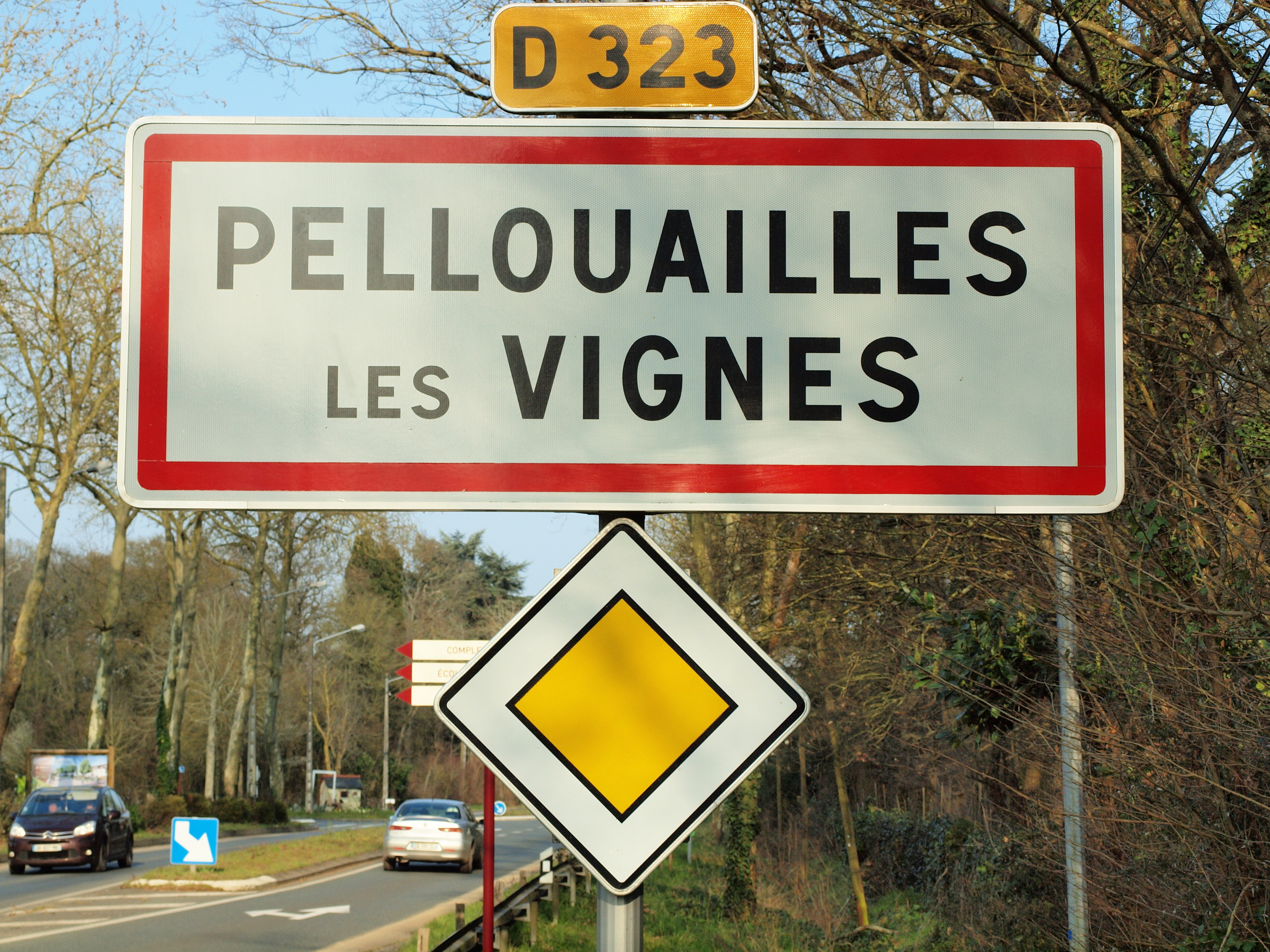 Pellouailles-les-Vignes (Maine-et-Loire, France)